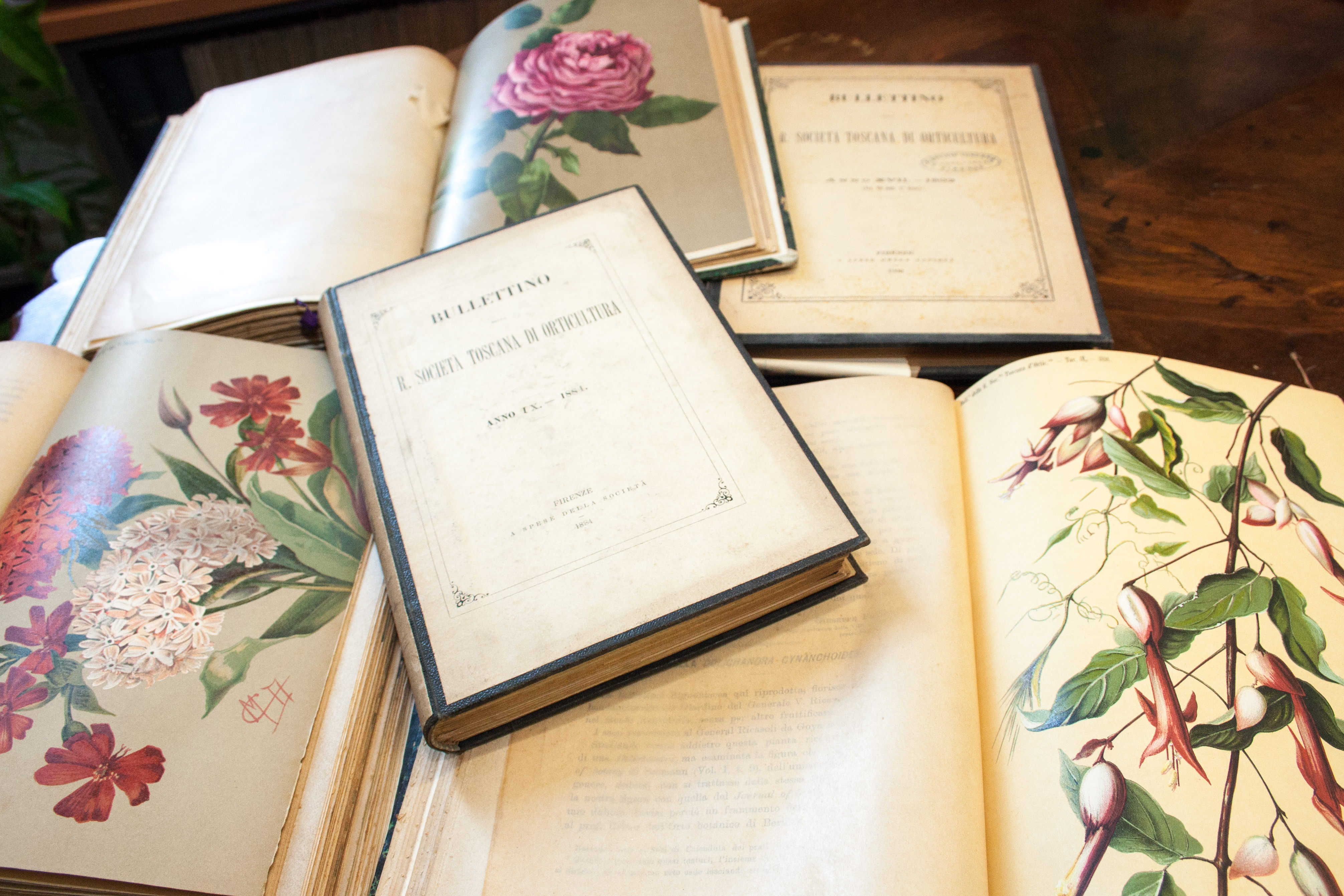 Alcune delle prime pubblicazioni del Bullettino della Società Toscana di Orticultura, ricche di meravigliose illustrazioni di piante e fiori